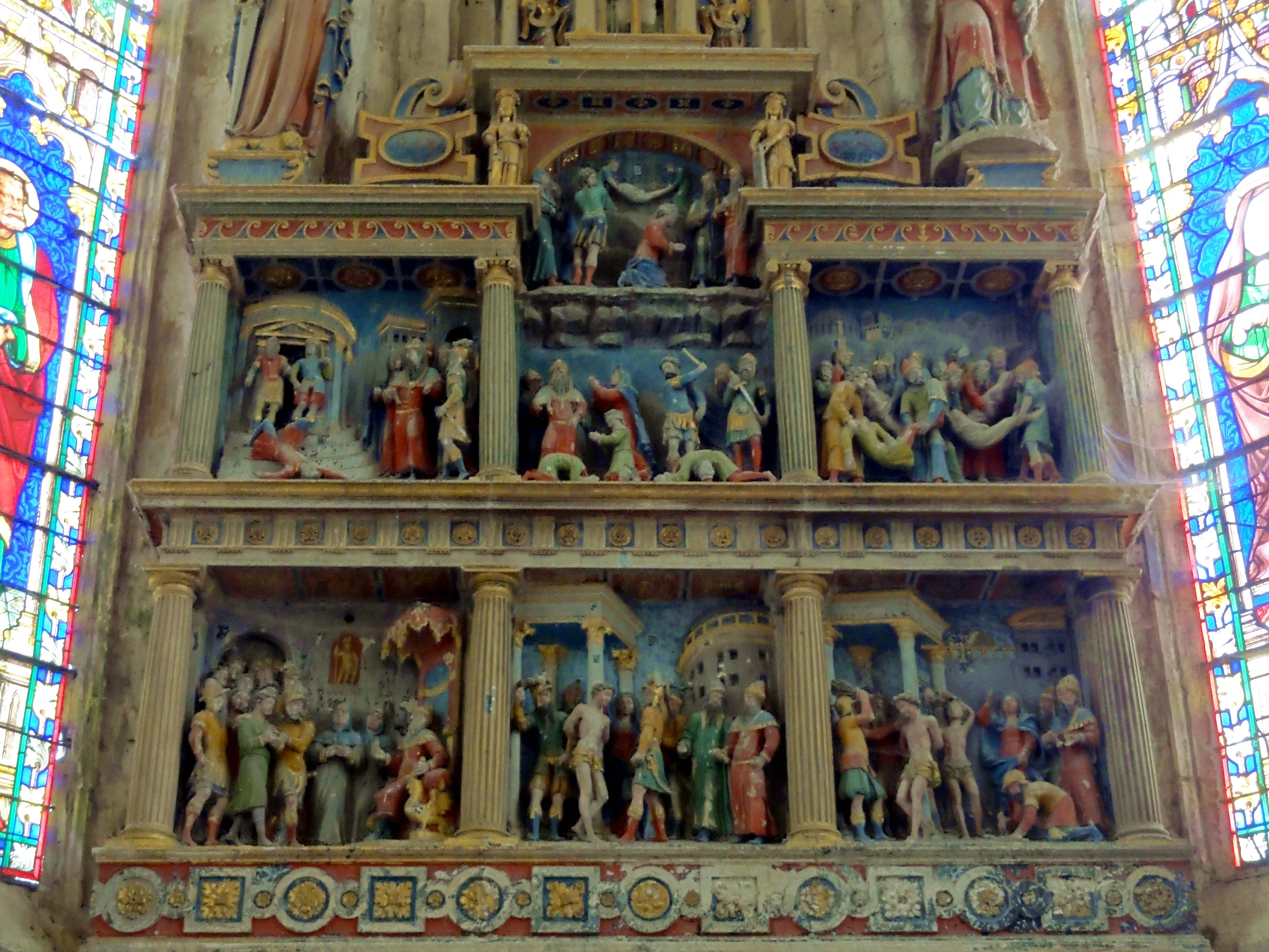 Retable du martyr de sainte Félicité et de ses deux fils, pierre calcaire polychrome, 1568.